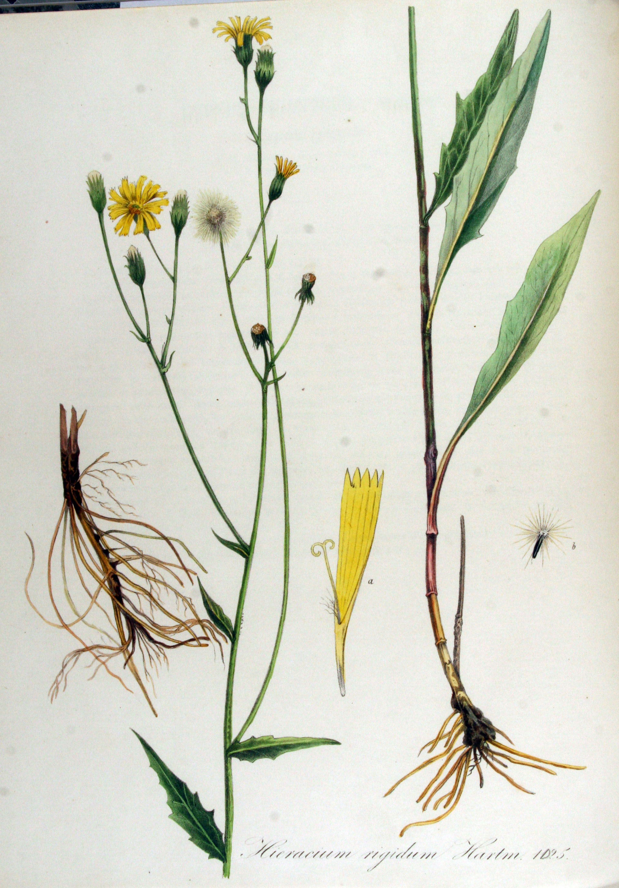 Hieracium laevigatum Willd. (Syn. Hieracium rigidum Hartm.)